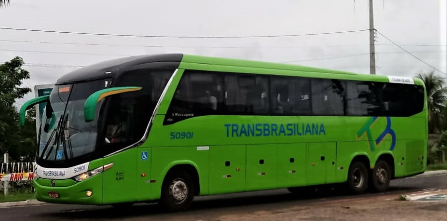 ônibus da Viação Transbrasiliana, uma empresa de transporte rodoviário de passageiros no Brasil, passando por Campo Maior em fevereiro de 2019.